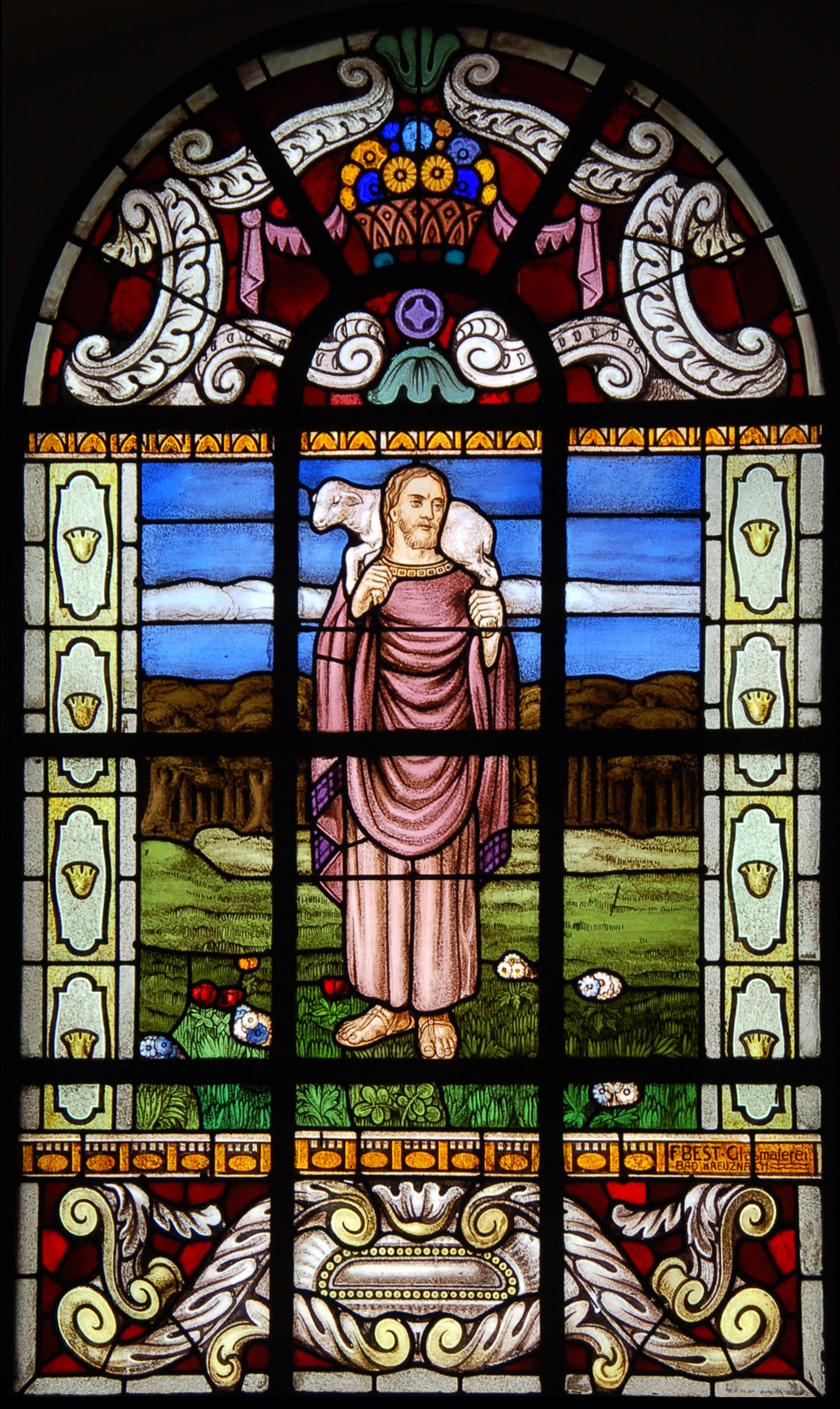 Kirche Woppenroth: Fenster „Der gute Hirte“